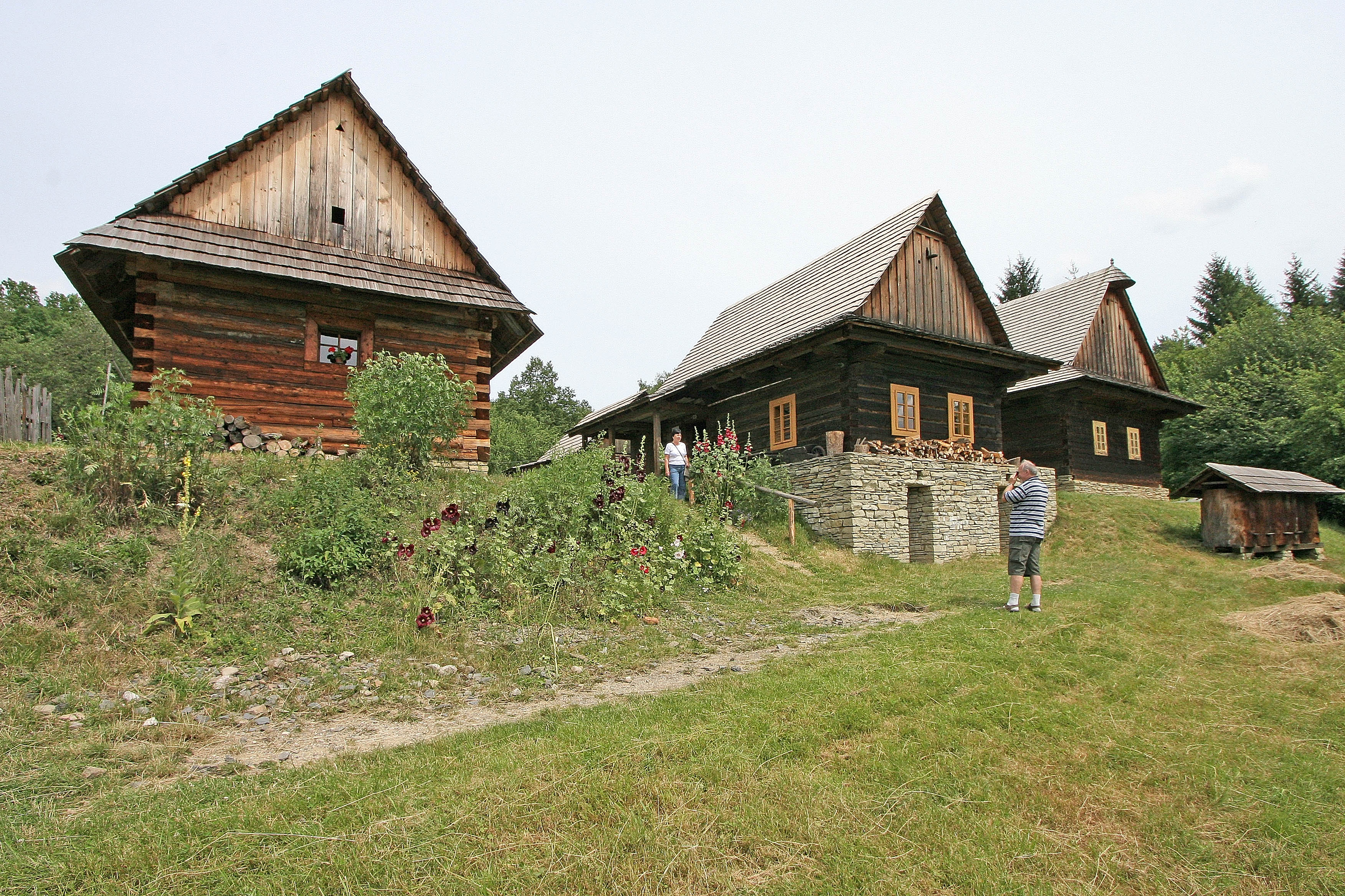 Skanzen_Valašská_dědina_-_usedlosti z_Nového_Hrozenkova